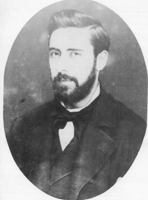 Manuel Curros Enriquez, 1851 - 1908.